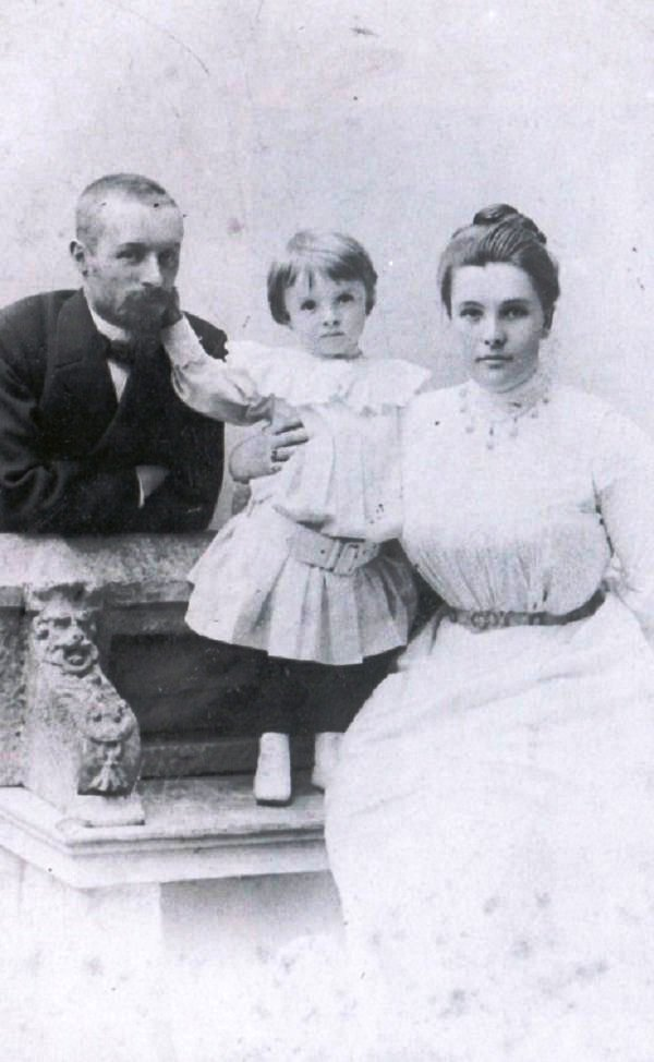 Дмитрий Николаевич Святополк-Мирский (1874—1950)с женой Марией Александровной (1878—1920) и сыном Александром (1899—1984).